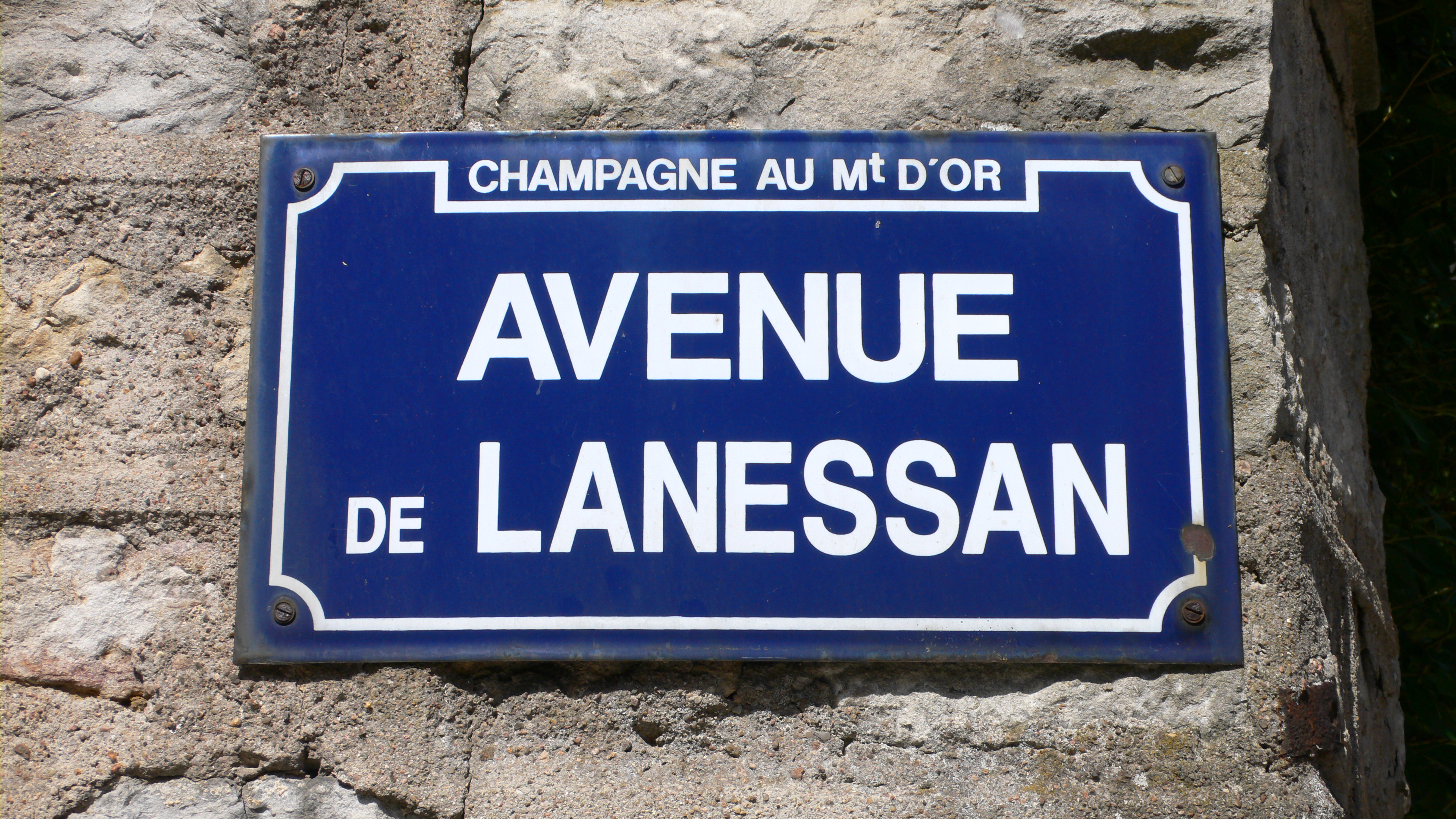 Champagne-au-Mont-d'Or. Plaque de rue